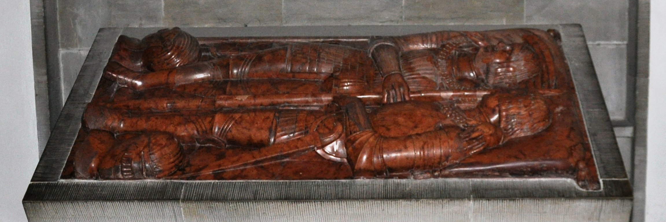 Warschau, St-Johannes-Kathedrale, Grabplatte der letzten Prinzen von Masowien